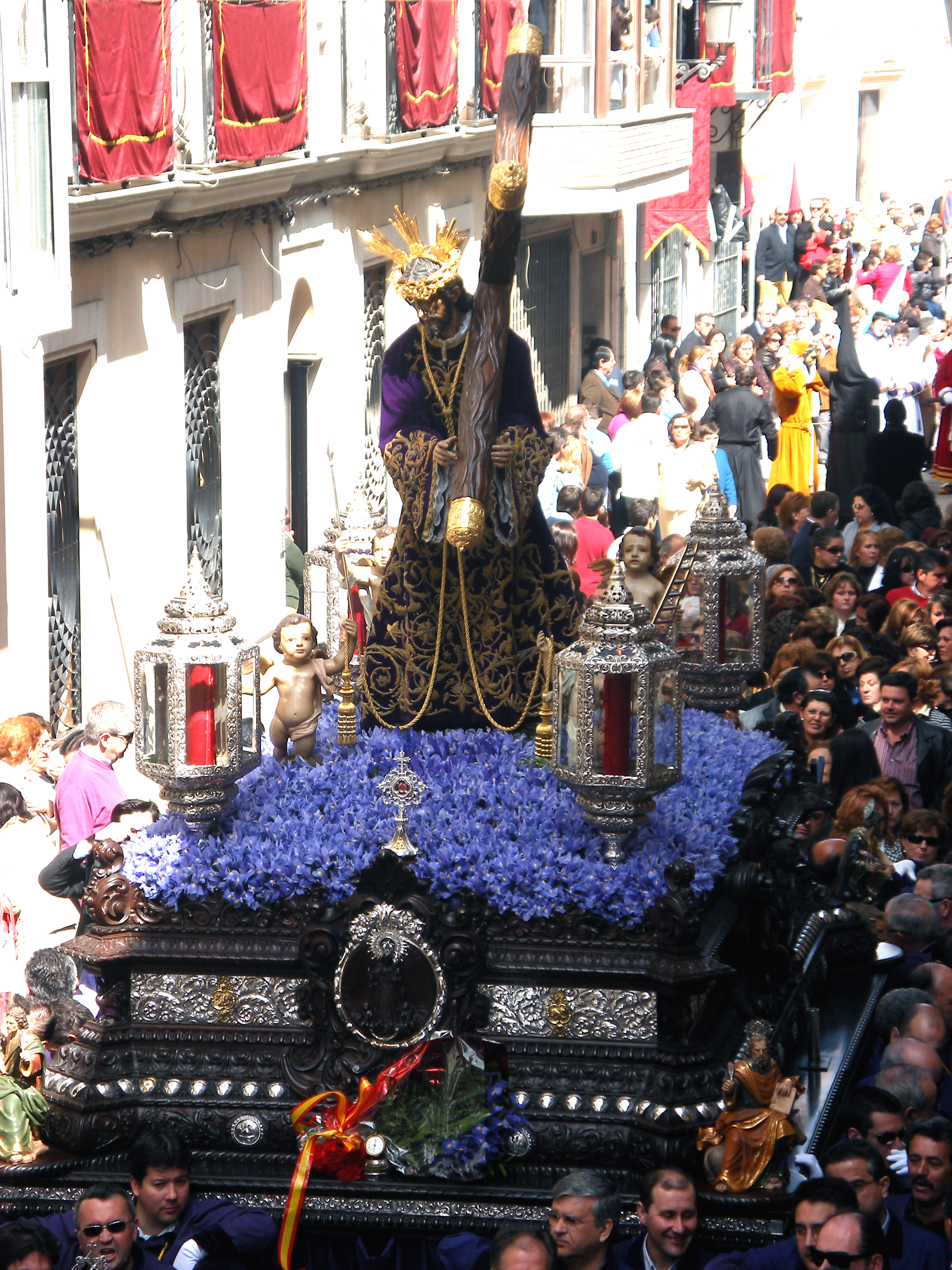 Jesús Nazareno, El Terrible, en Puente Genil (Córdoba, España)